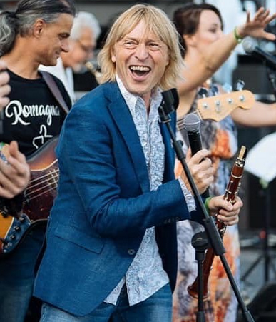 Moreno Conficconi e Jovanotti al Jova Beach Party 2019